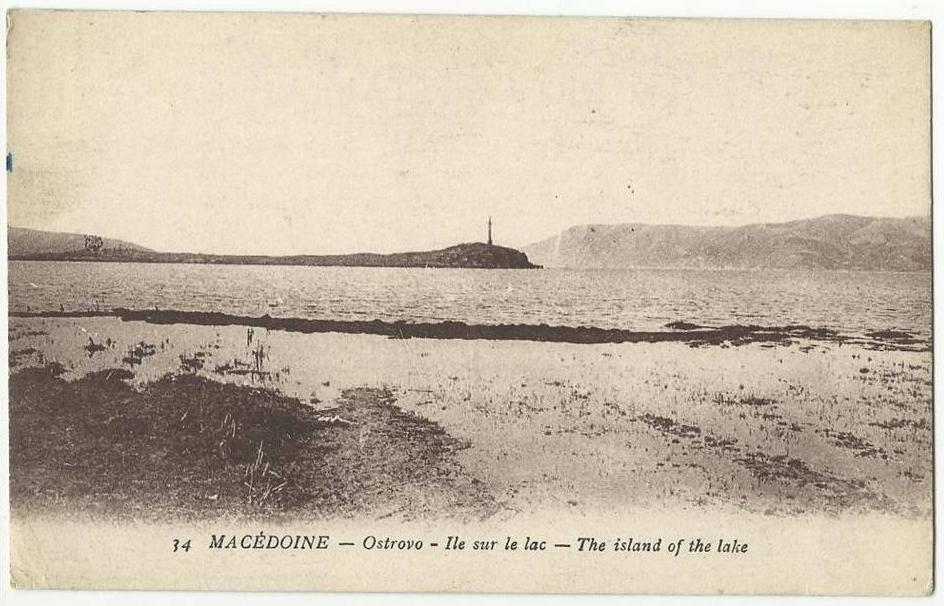 Острово през Първата световна война.